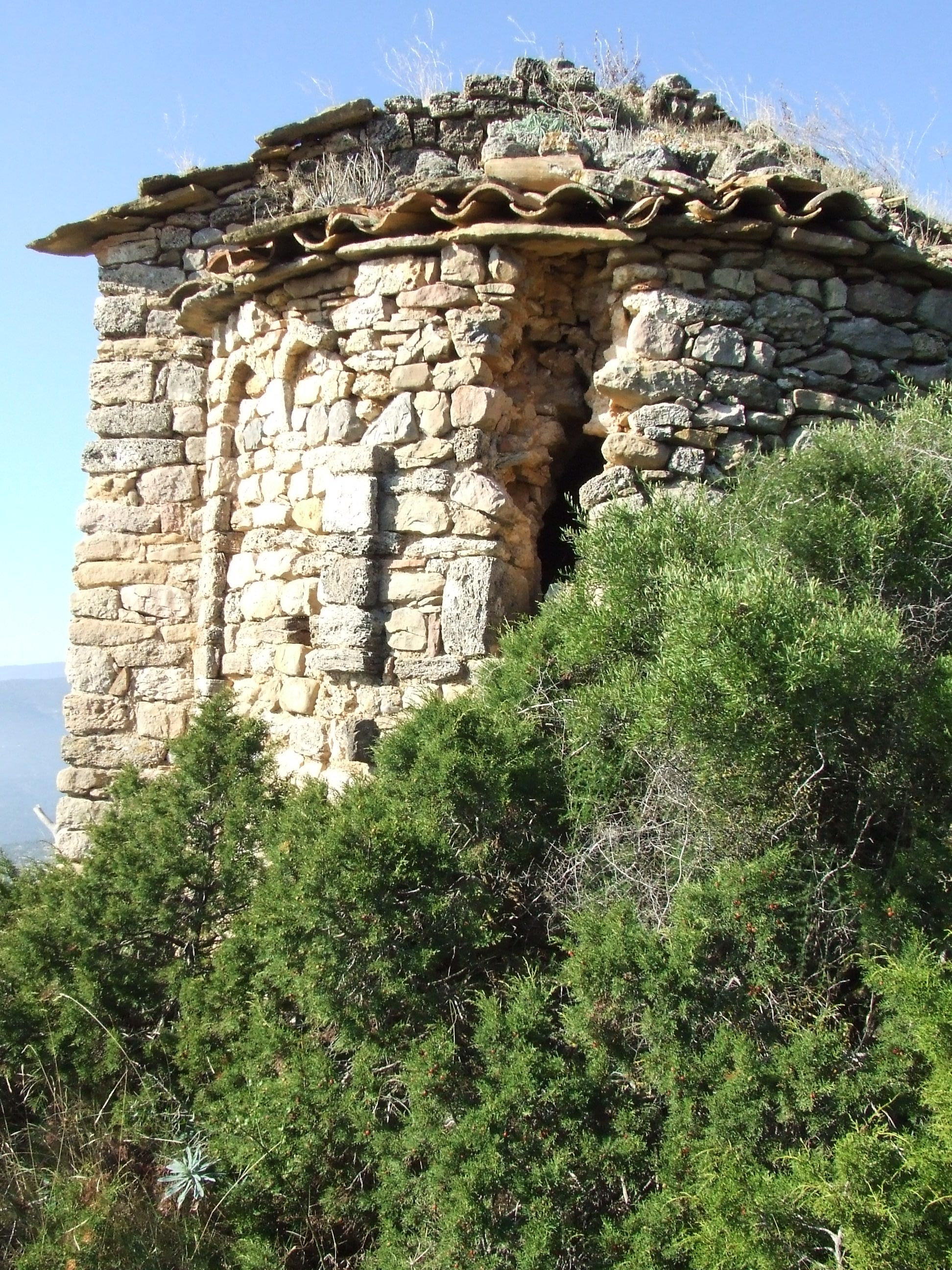 Església de Santa Anna de Montadó (Benavent de la Conca, Isona i Conca Dellà, Pallars Jussà)